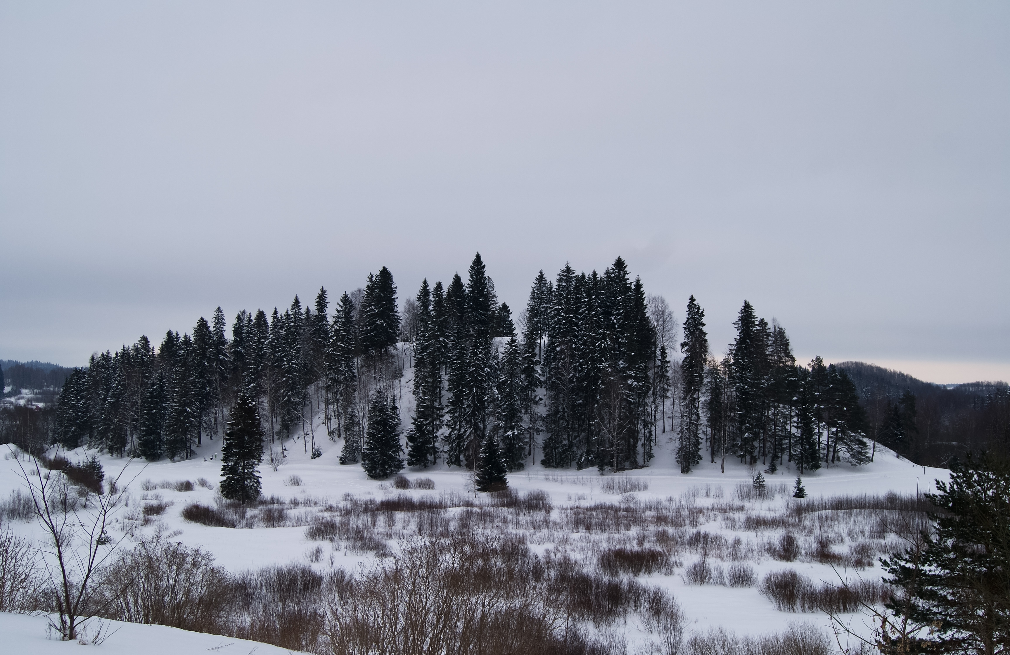 Otepää